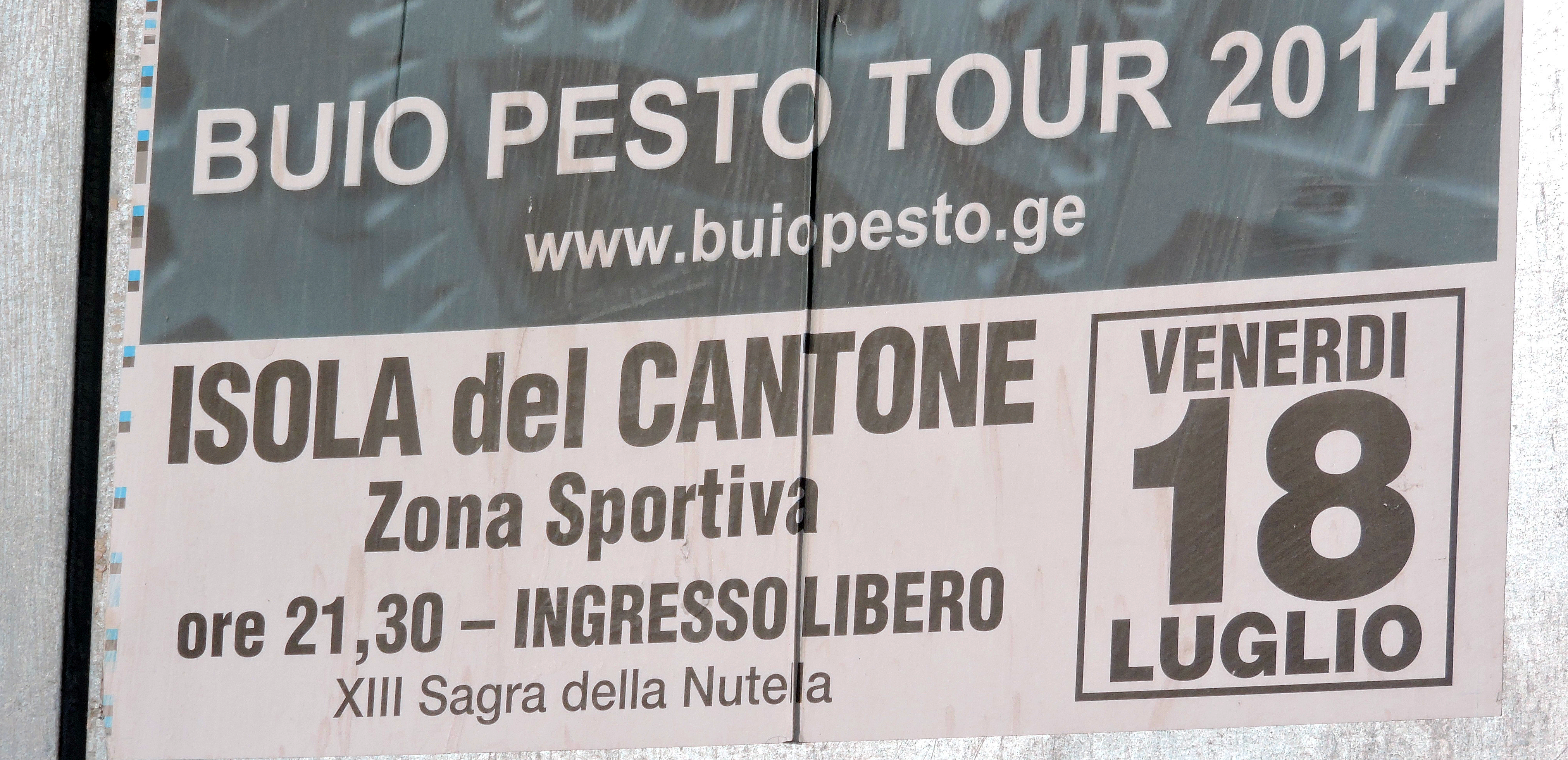 Buio Pesto 2014 tour (manifesto a Ronco Scrivia)